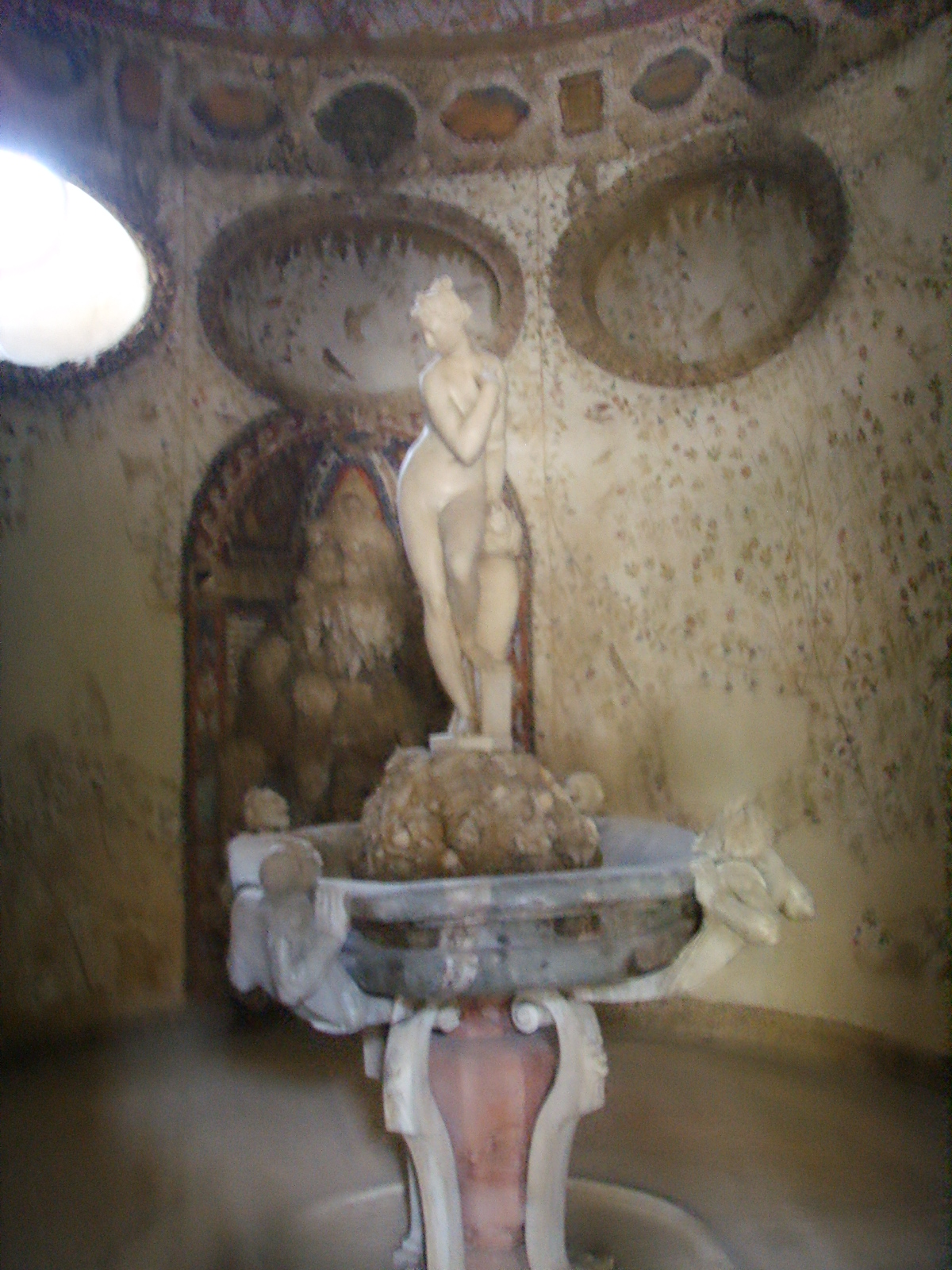 Grotta del buontalenti, Venere che esce dal bagno del Giambologna